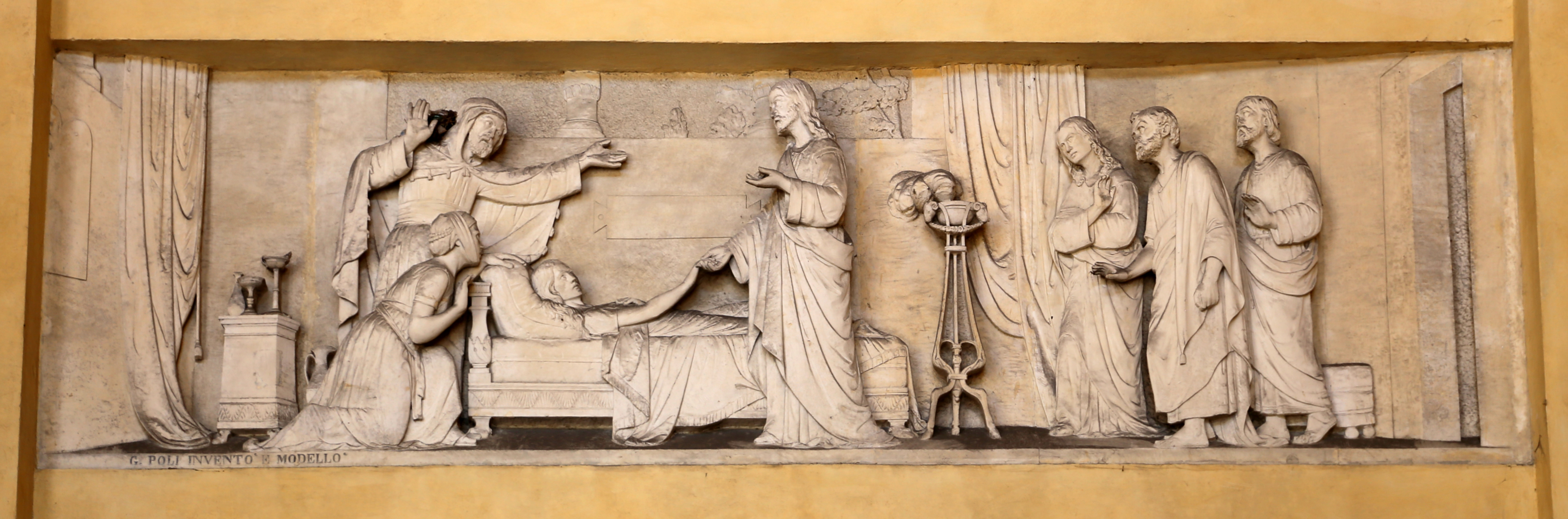 cimitero monumentale di Verona This is a photo of a monument which is part of cultural heritage of Italy.